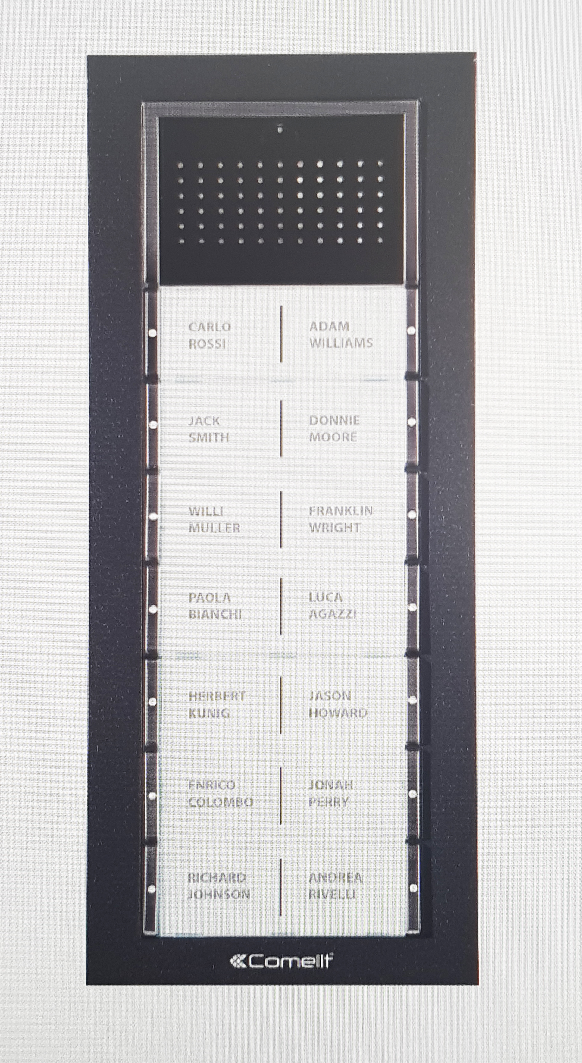 Citofono esterno nero analogico con bulsantiera, targhe porta nome, altoparlante e microfono